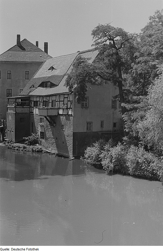 Original image description from the Deutsche Fotothek Blick über den Fluß auf ein Fachwerkhaus